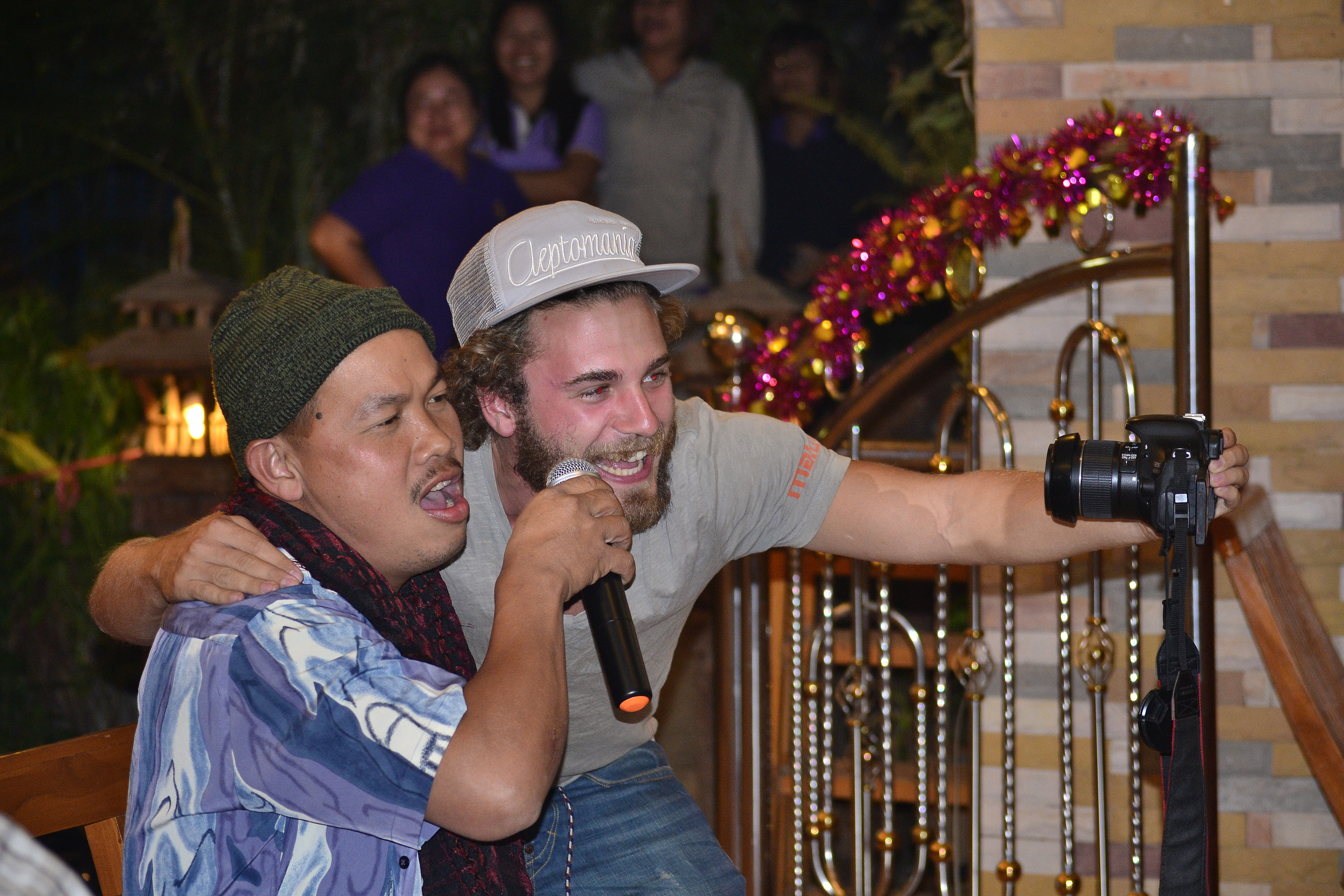 Treffen einer ehemaligen Klasse im Sila Resort zu Sukhothai zur Feier ihrer Graduierung vor 20 Jahren im Jahre 1993